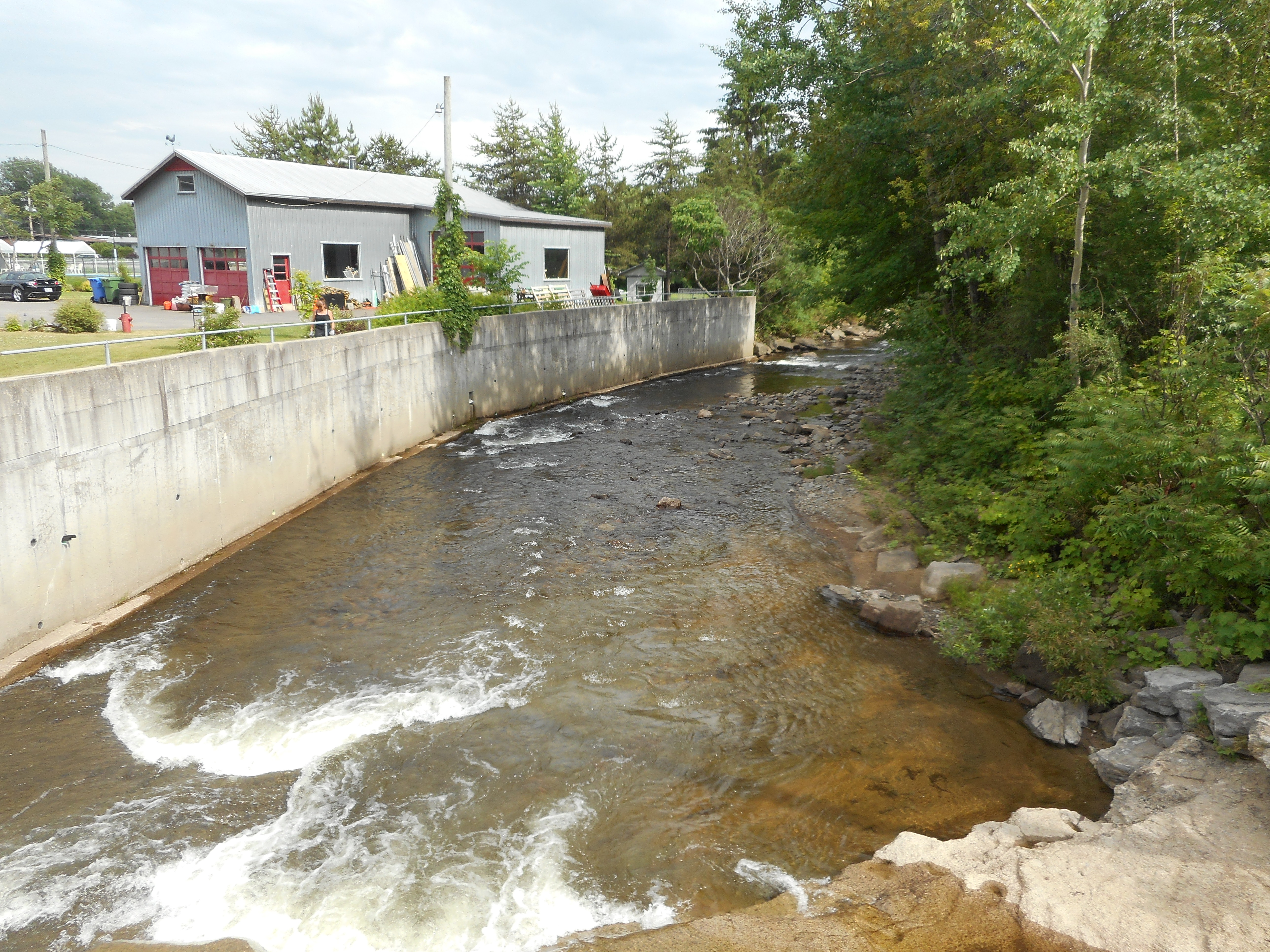 Rivière du Sault à la Puce, à Château-Richer Vue du pont de la route 360, regardant vers l'aval (le sud-est)